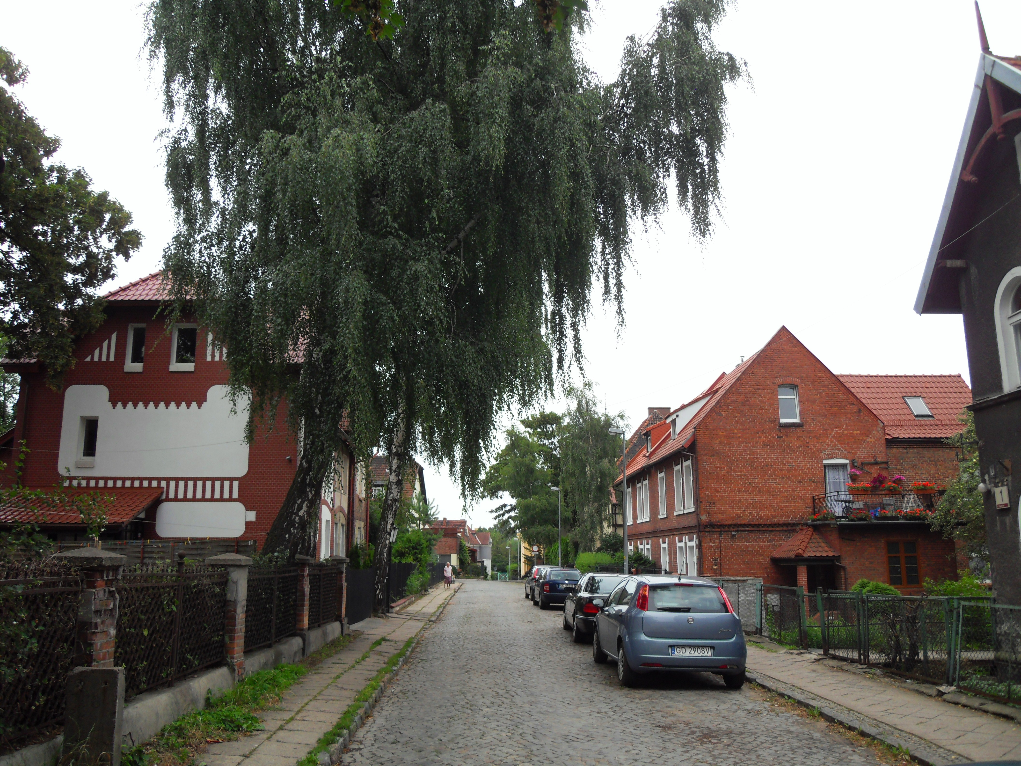 Gdańsk Wrzeszcz Dolny, ul. Saperów.